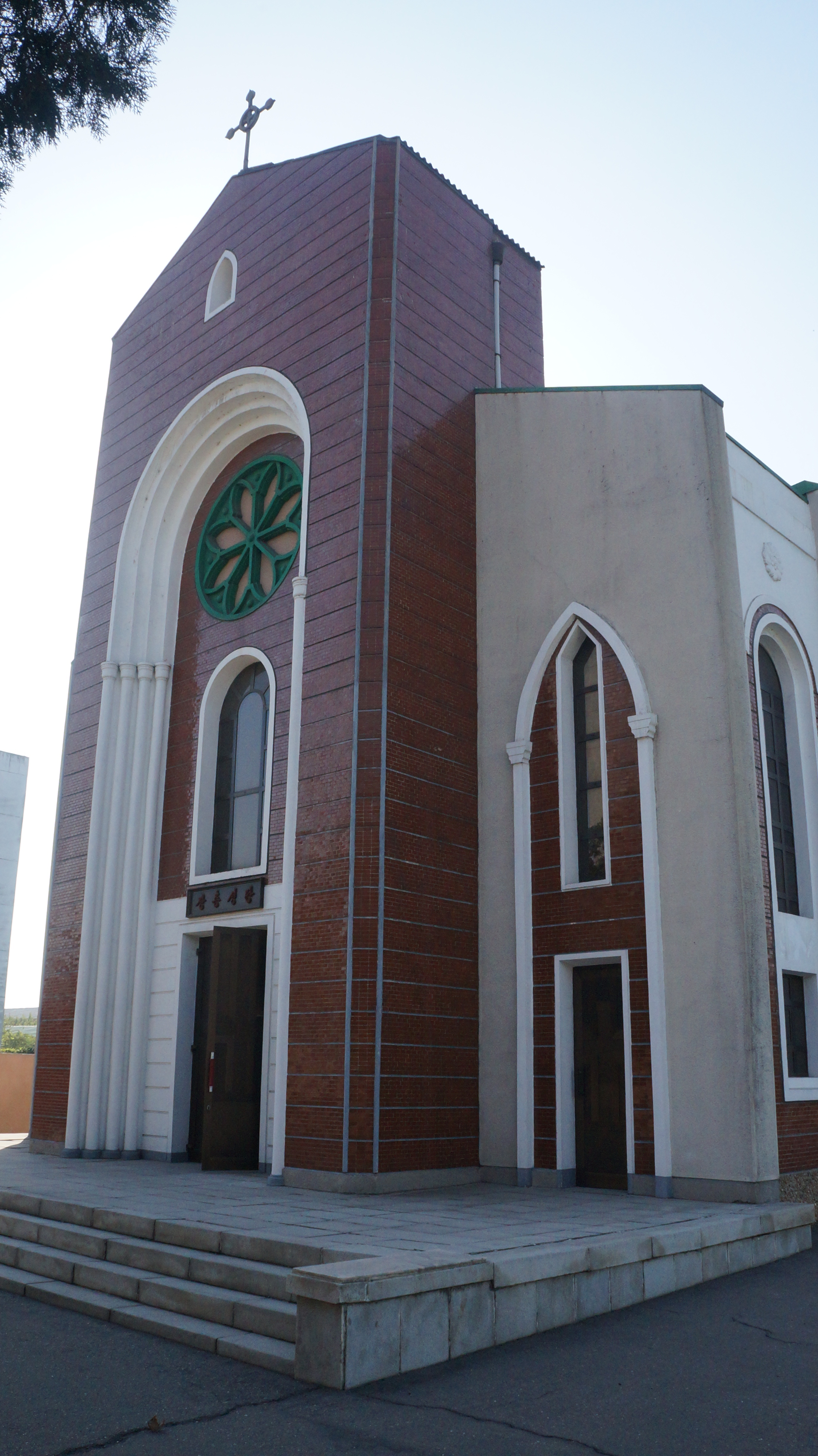 Pyongyang North Korea DPRK